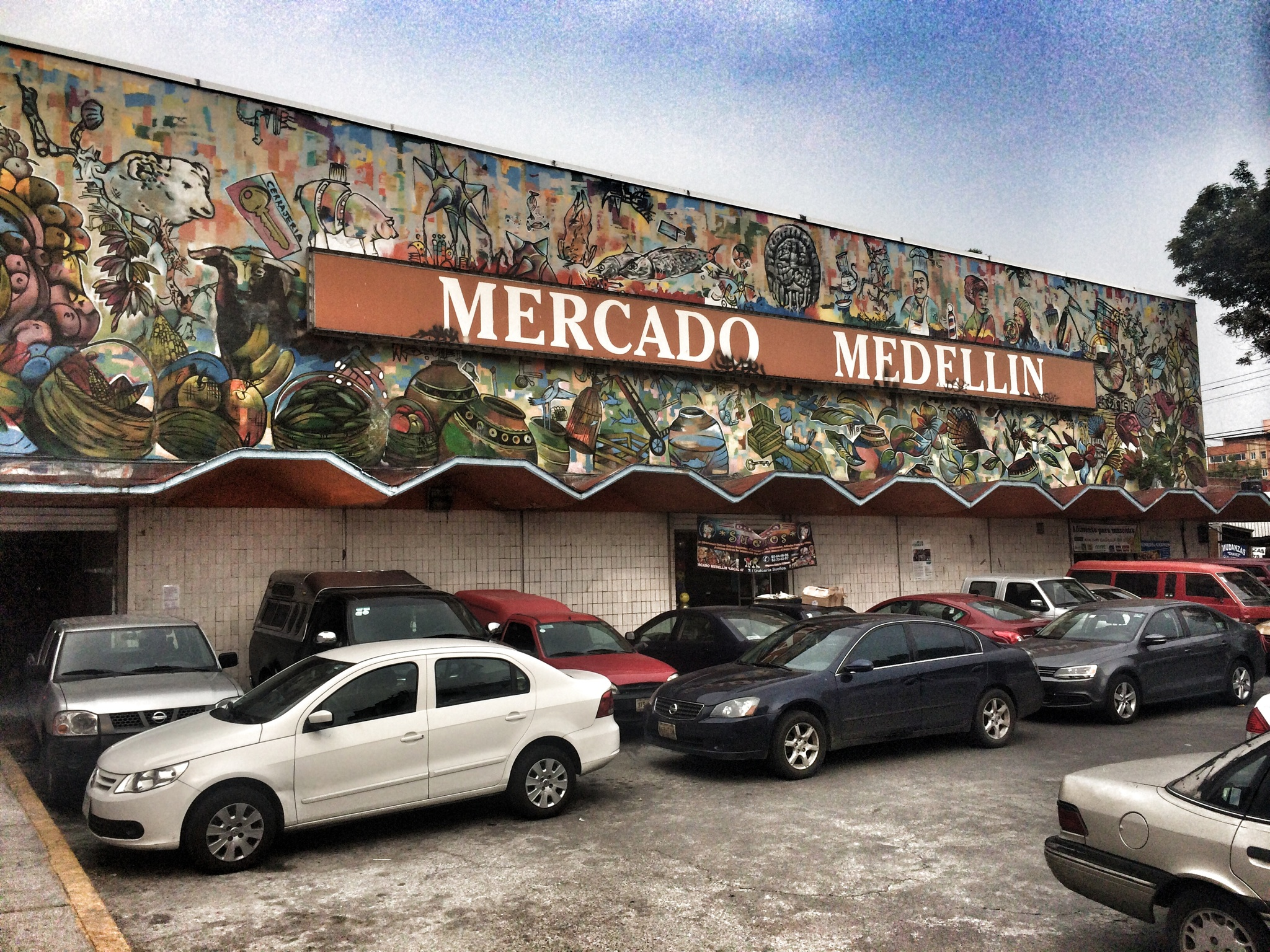 Mercado Medellín